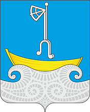 Герб Холмогорского района, Архангельская область, Россия